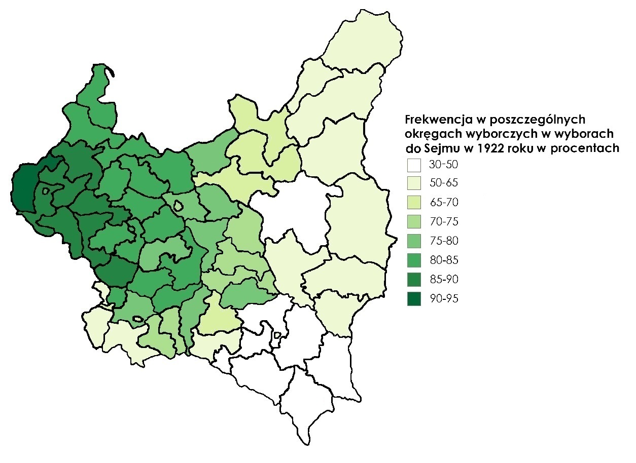 mapa II RP podzielona na okręgi wyborcze z naniesioną frekwencją